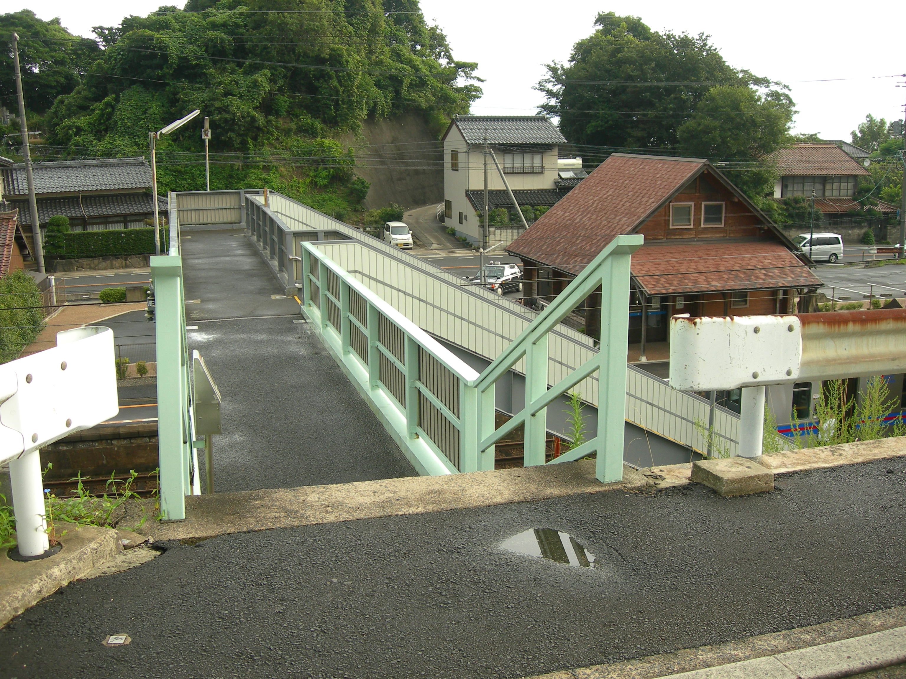 来待駅南口